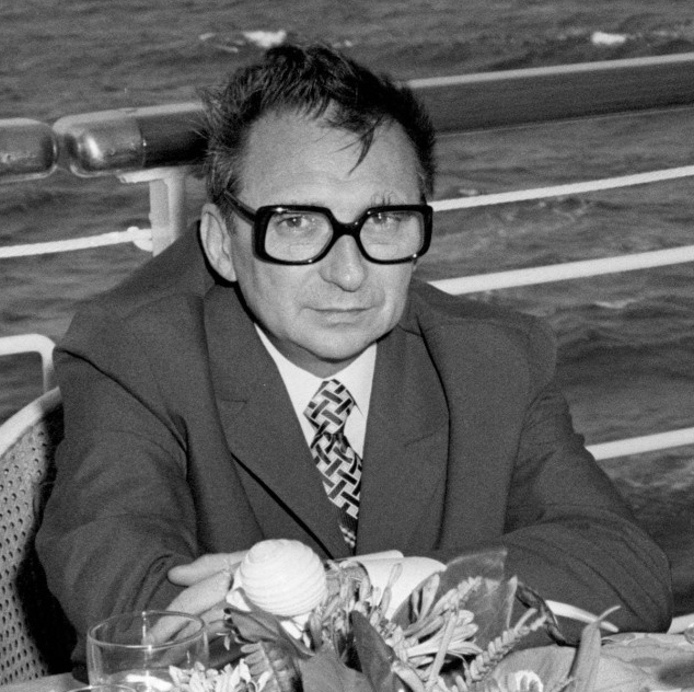 Ion Mihai Pacepa, Seful Serviciilor Secrete din România — 1975